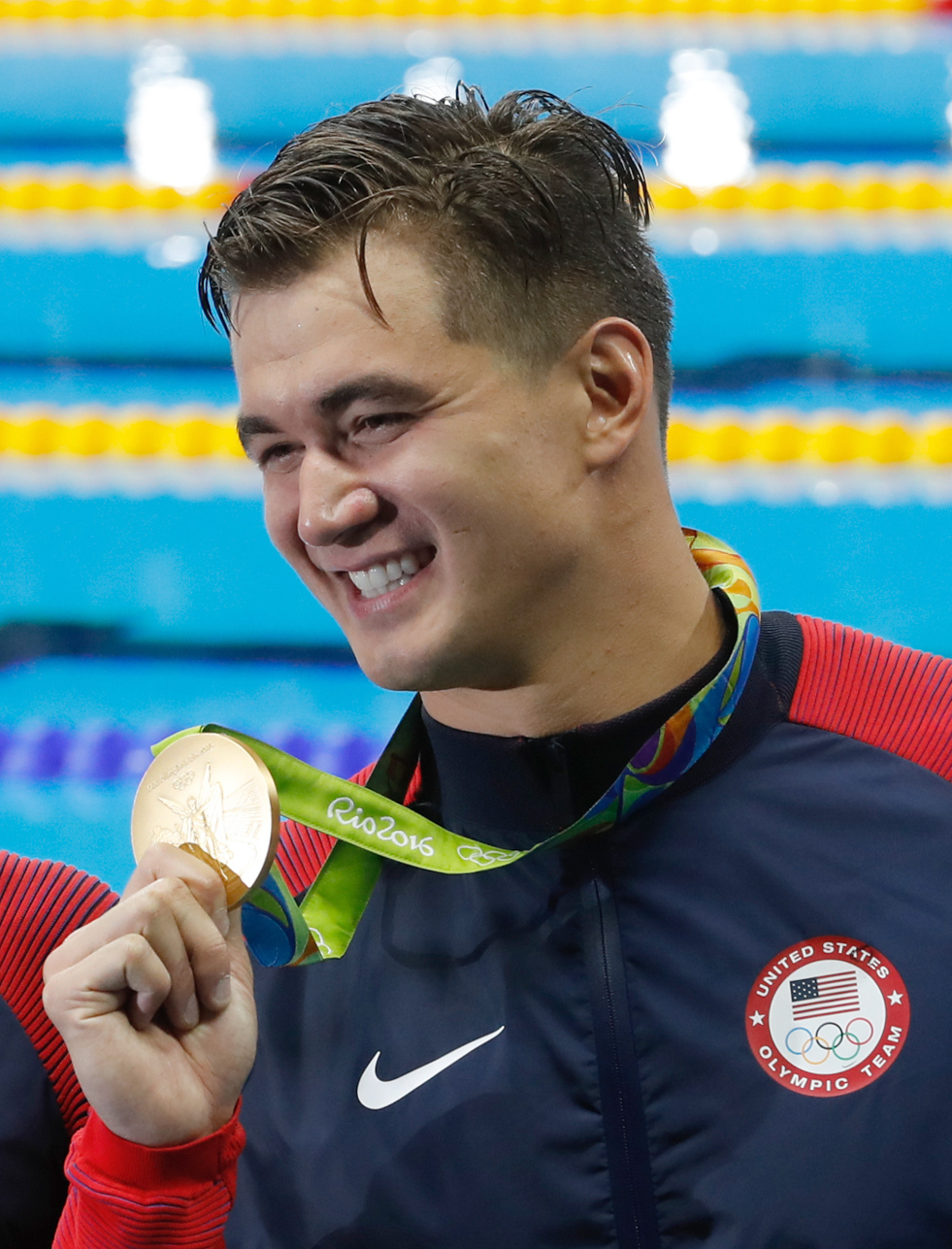 Rio de Janeiro - Nadadora norte-americana Katie Ledecky bate recorde mundial e leva medalha de ouro nos 400m livre nos Jogos Olímpicos Rio 2016 (Fernando Frazão/Agência Brasil)